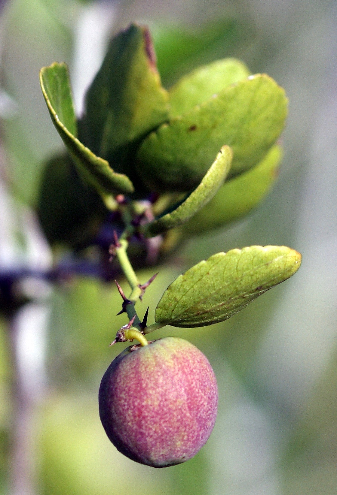 File derived from